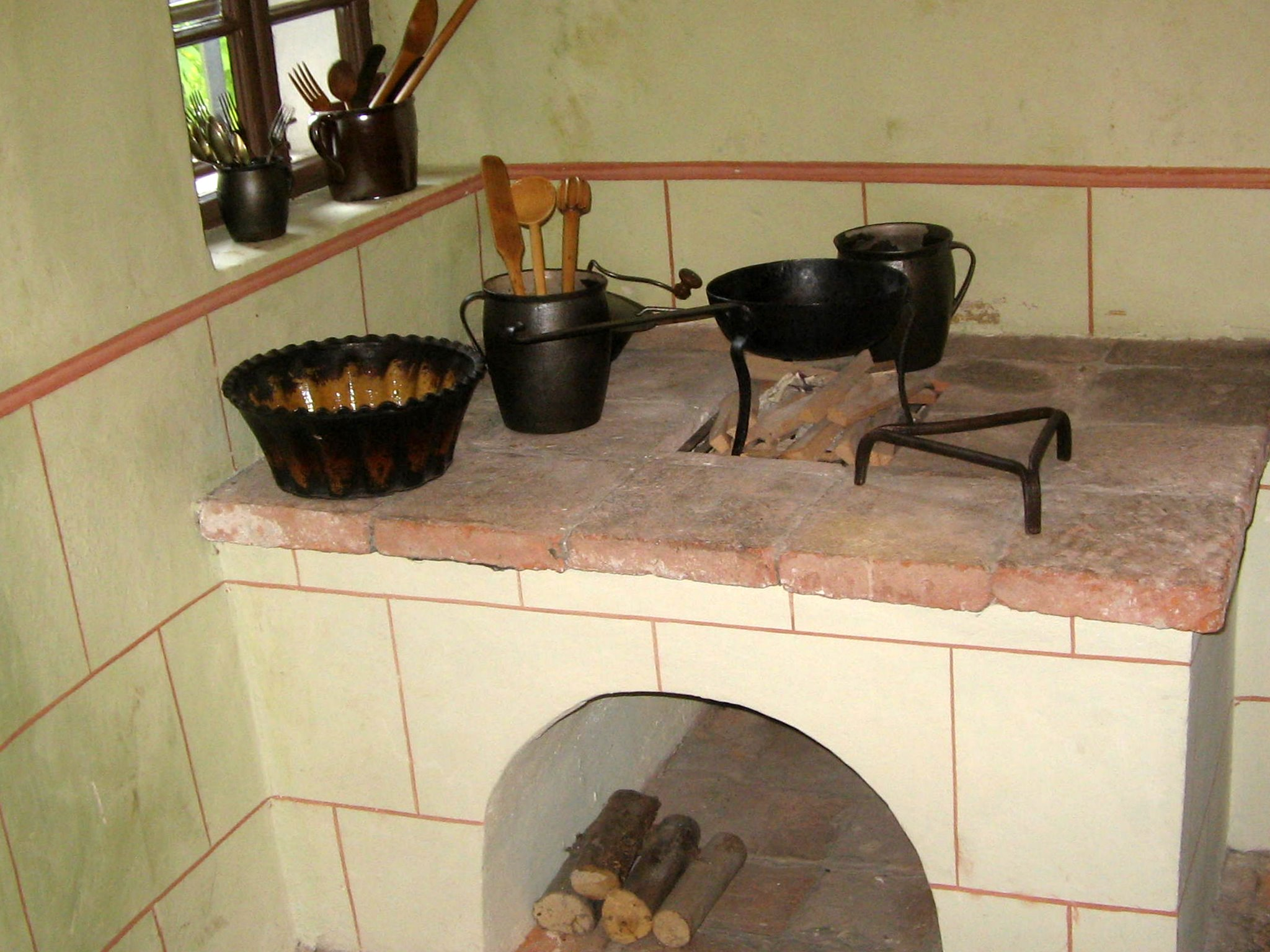 Rudarska hiša,Idrija, Slovenija